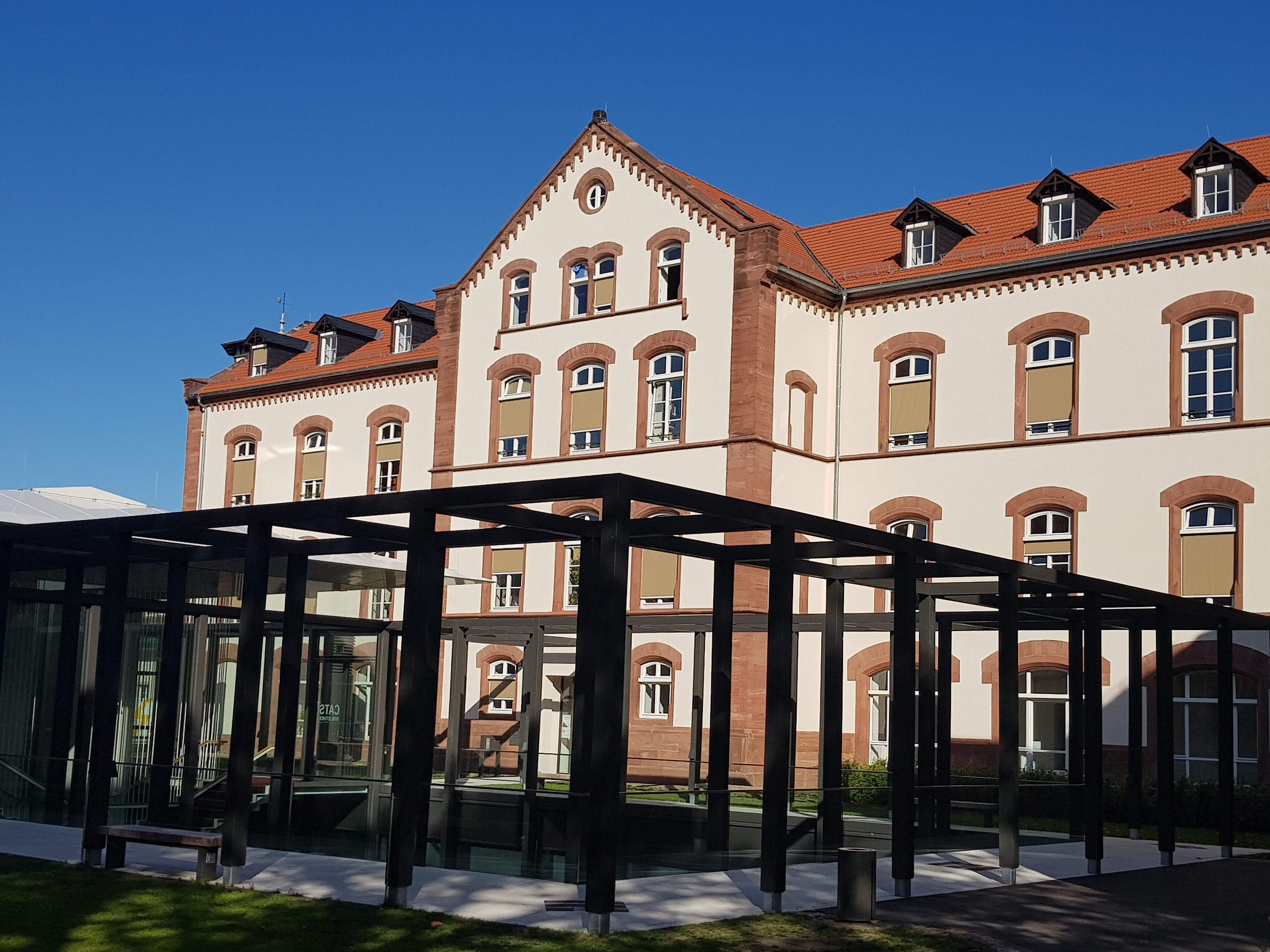 Das Südasien-Institut (SAI) im Centrum für Asienwissenschaften und Transkulturelle Studien (CATS) der Universität Heideberg